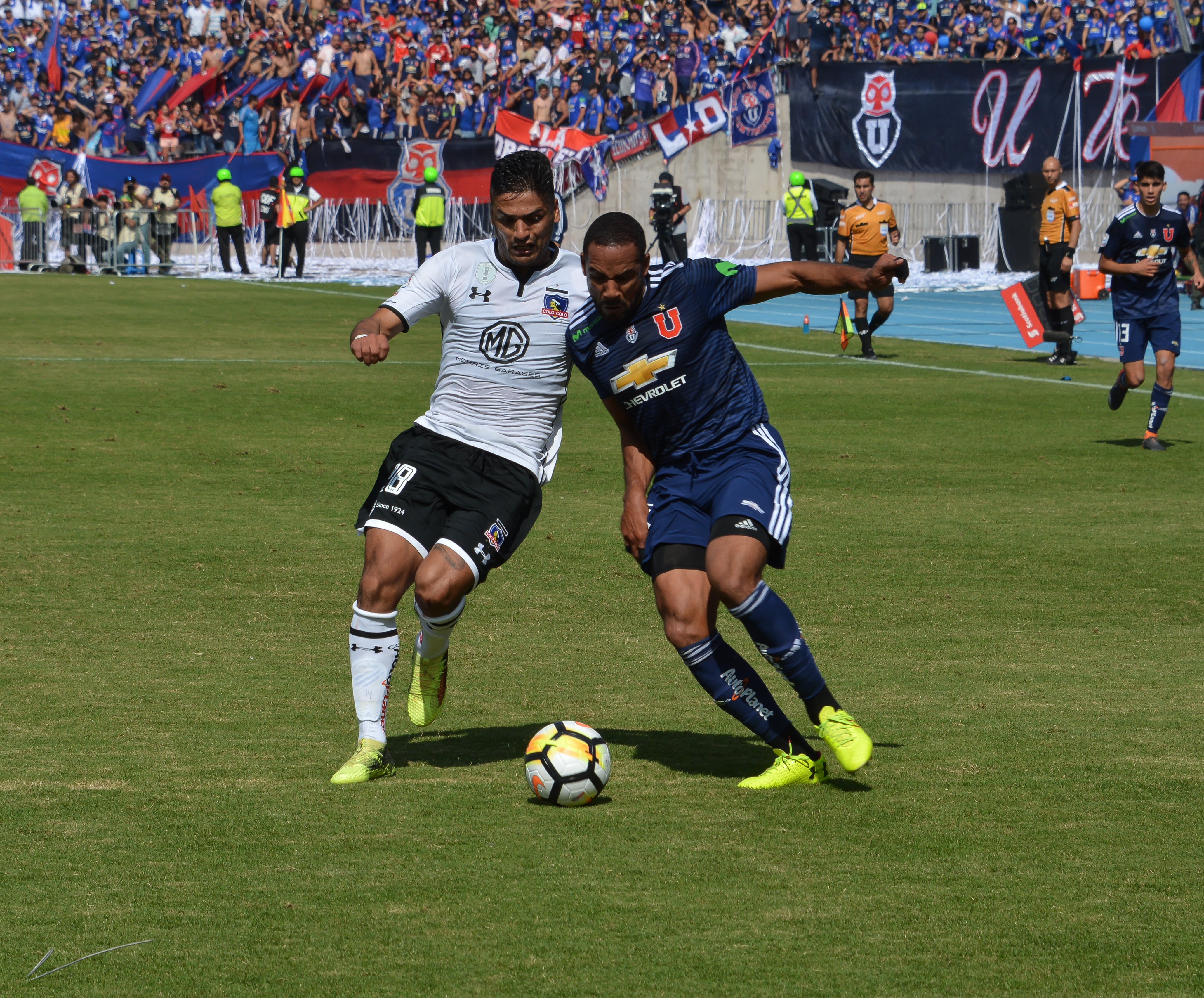 Universidad de Chile v Colo-Colo, Estadio Nacional, Santiago, Chile.